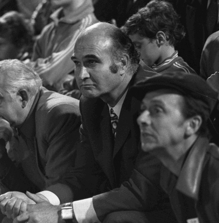 Marcel Leclerc lors du match OM-Ajax du 20 octobre 1971.